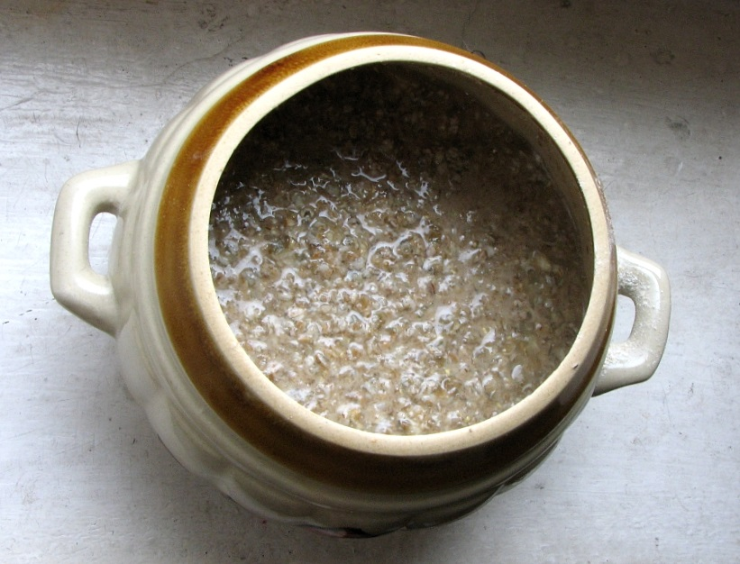 zakwas na żur